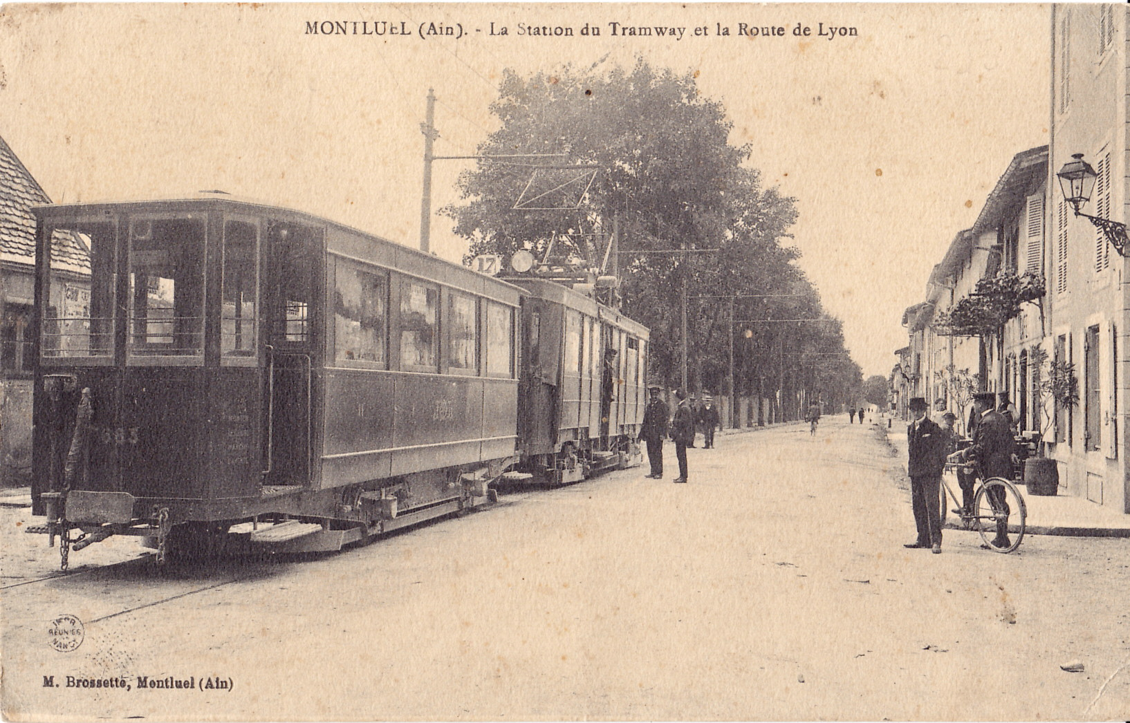 Carte postale ancienne éditée par M. Brossette à Montluel : MONTLUEL - La Station du Tramway et la Route de Lyon